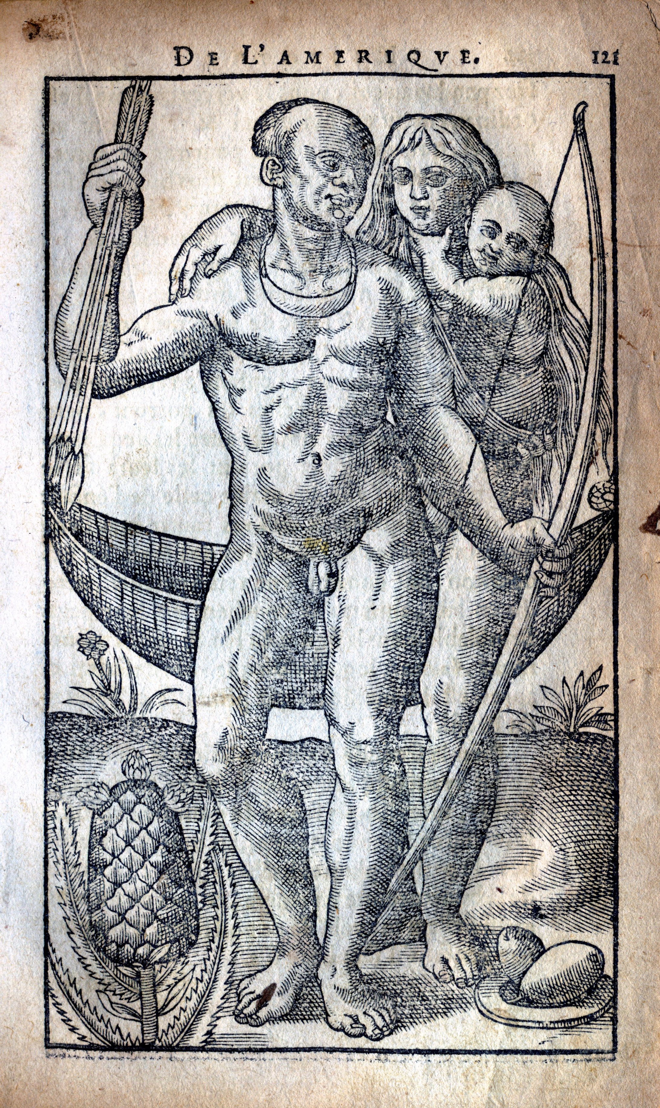 Gravure illustrant l' Histoire d'un voyage fait en la terre du Brésil, de Jean de Léry : Famille d'Amérindiens du Brésil